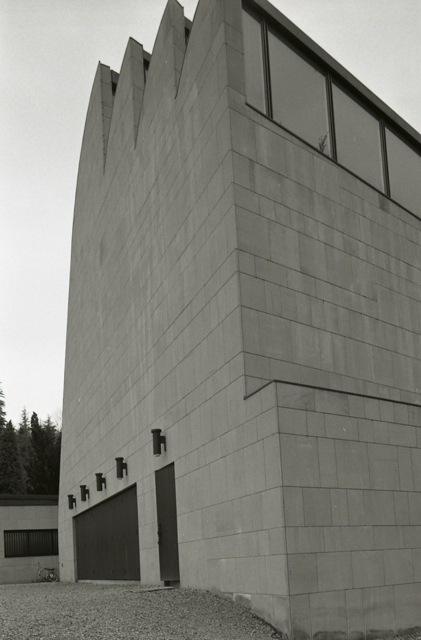 Servizio fotografico : Vergato, 1980 / Paolo Monti. - Strisce: 2, Fotogrammi complessivi: 6 : Negativo b/n, gelatina bromuro d'argento/ pellicola ; 35 mm. - ((Sul portanegativi: N[I]K[MA]T-EL FP4. - Occasione: Documentazione secondo le indicazioni del Professor Paolo Guidotti. - : Nikon Leika 3001-/ Monti 1978 (1978-1982), presso Archivio Paolo Monti. - Fonte: Fattura di Paolo Monti: IV. Commesse/ Fattura n. 26/ Riprese con Prof. Guidotti - Bocca di Rio e altro (1980/05/19), presso Archivio Paolo Monti. N. 63 fotografie riprese. Fattura manoscritta a penna nera intestata all'Amministrazione comunale di Bologna e datata 19-5-1980. - Fonte: Agenda di Paolo Monti